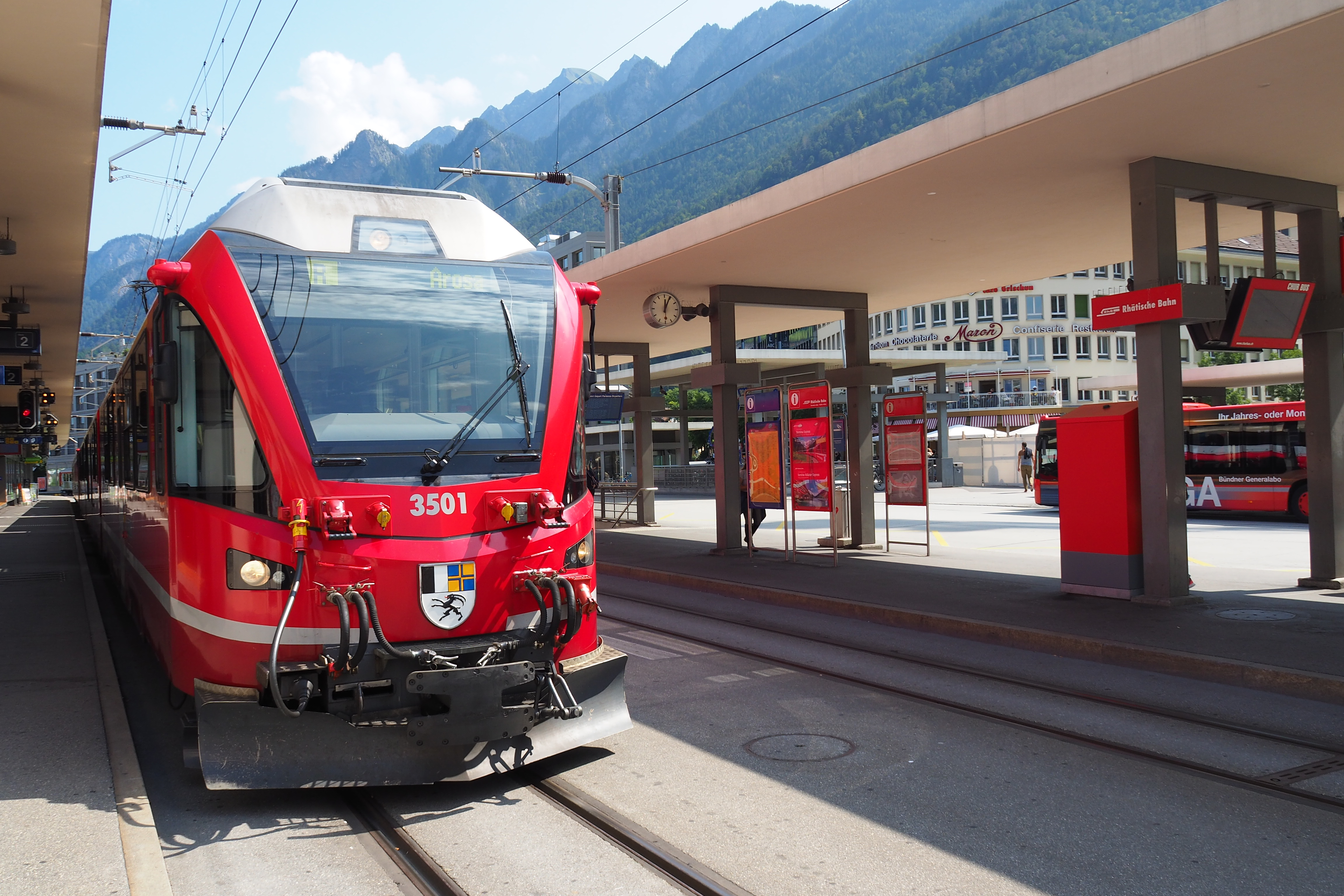 The front of ABe 8/12 3501 EMU, photo taken in Chur station.